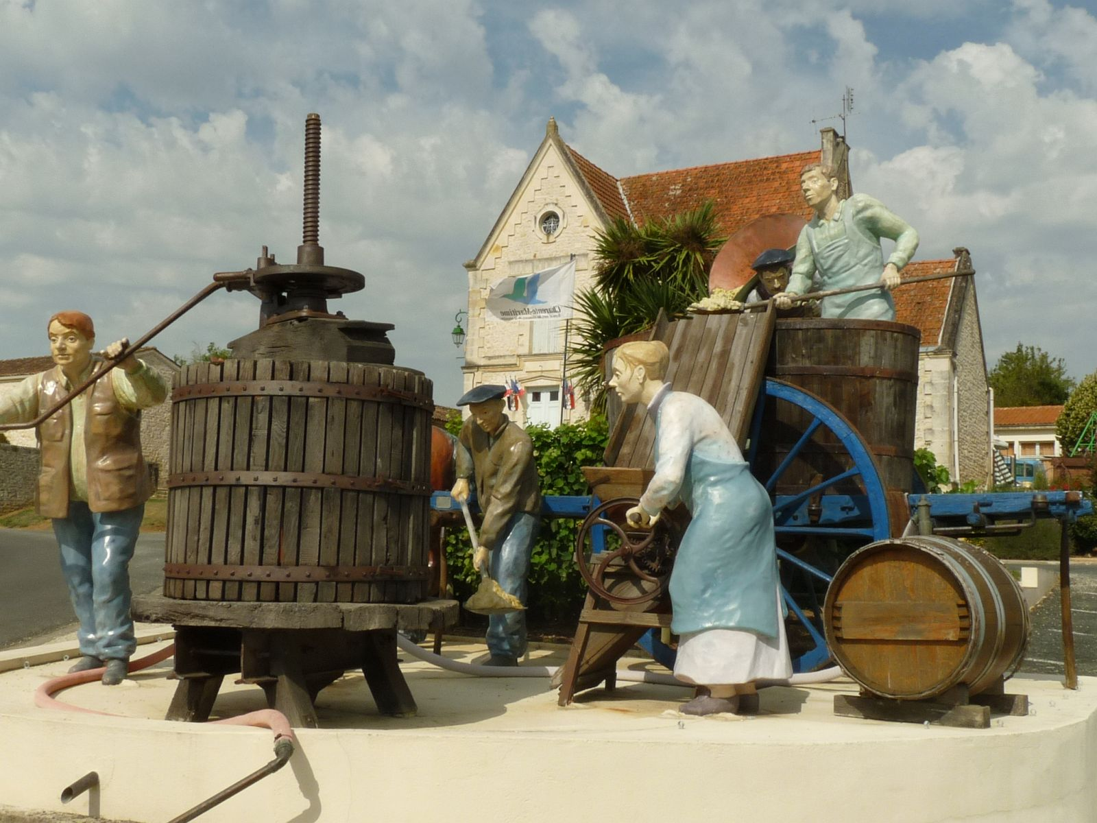 monument devant la mairie de Virollet (17), France, évoquant les vendanges - oeuvre de Jean-Luc Plé, créateur de ronds-points(r)